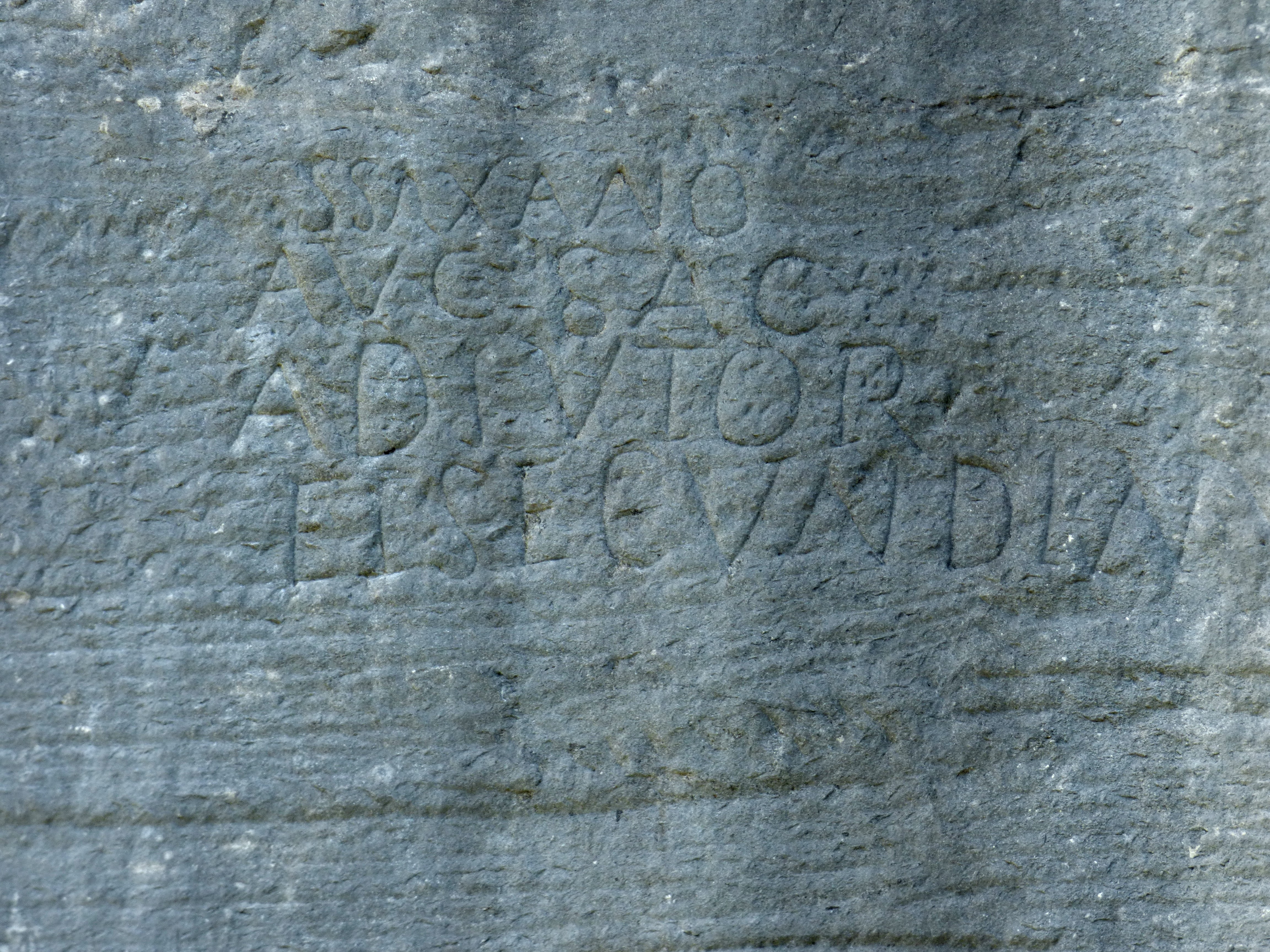 Römischer Steinbruch Spitzelofen, Gemeinde St. Georgen im Lavanttal, Kärnten Römerzeitliche Lateinische Inschrift